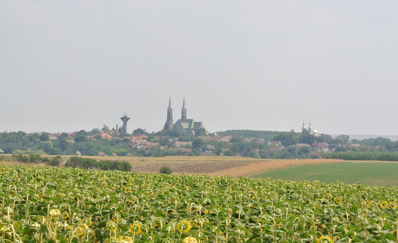 Panorama města